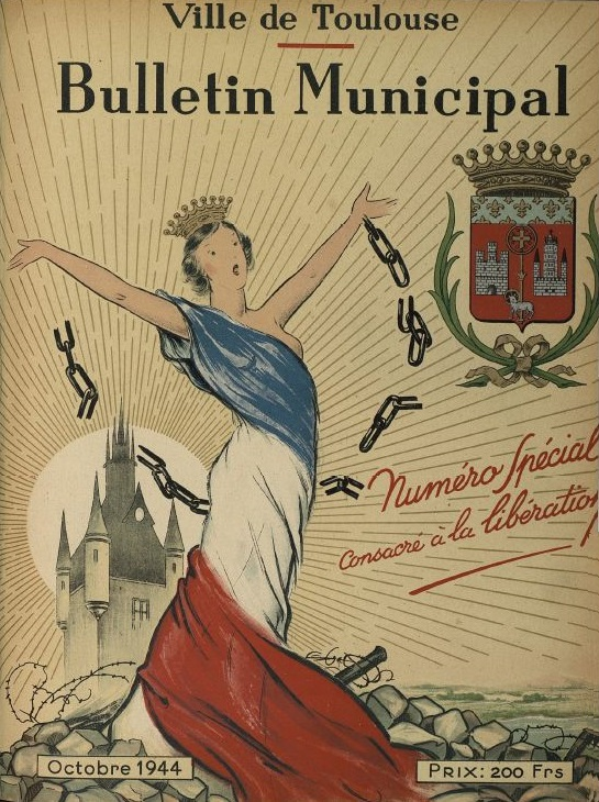 Le Bulletin municipal de la ville de Toulouse du 31 octobre 1944, numéro spécial consacré à la Libération de la ville.